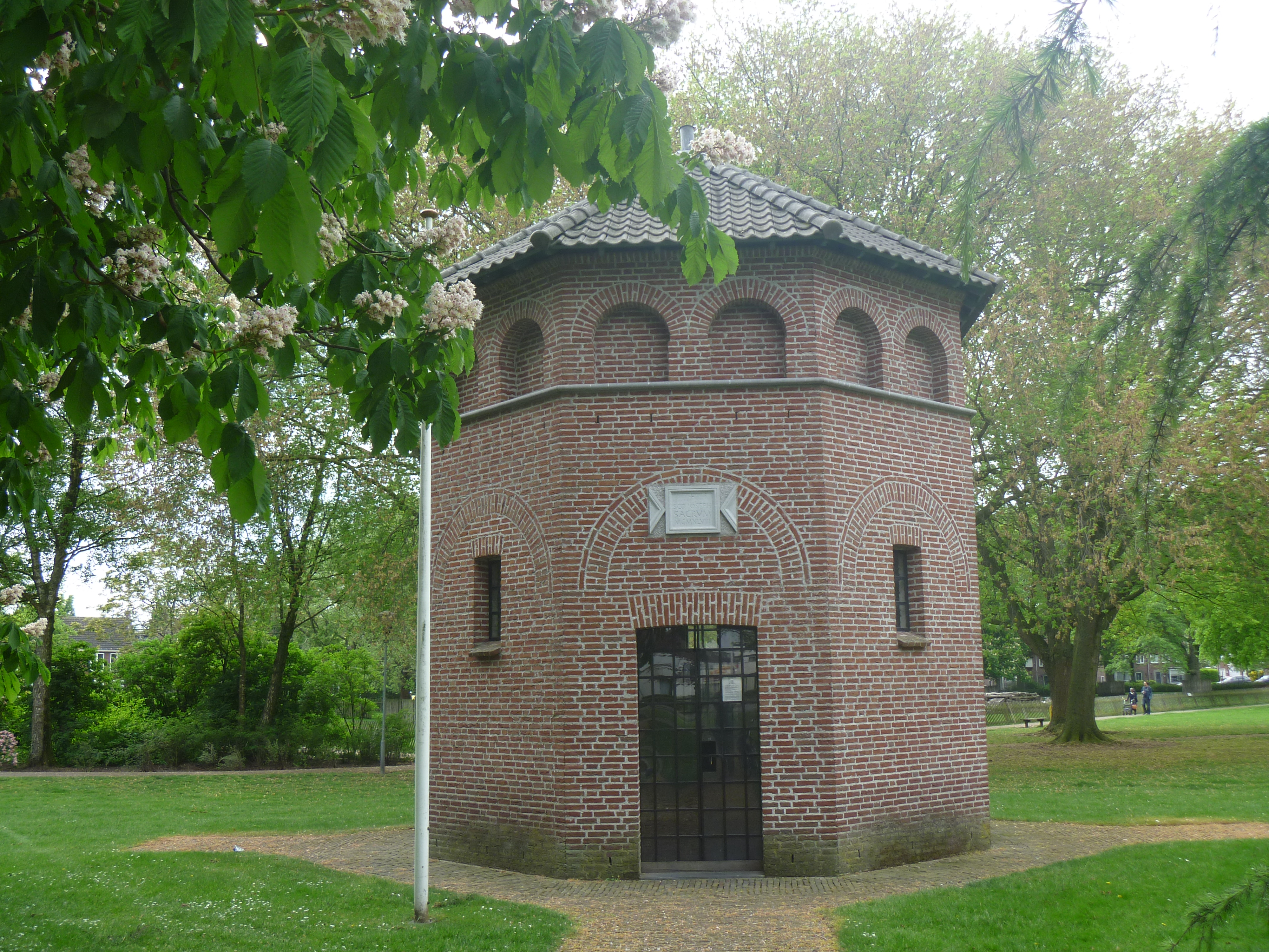 St. Jozef Gedachtenis Kapel Monument voor Helmondse oorlogsslachtoffers 1939-1950